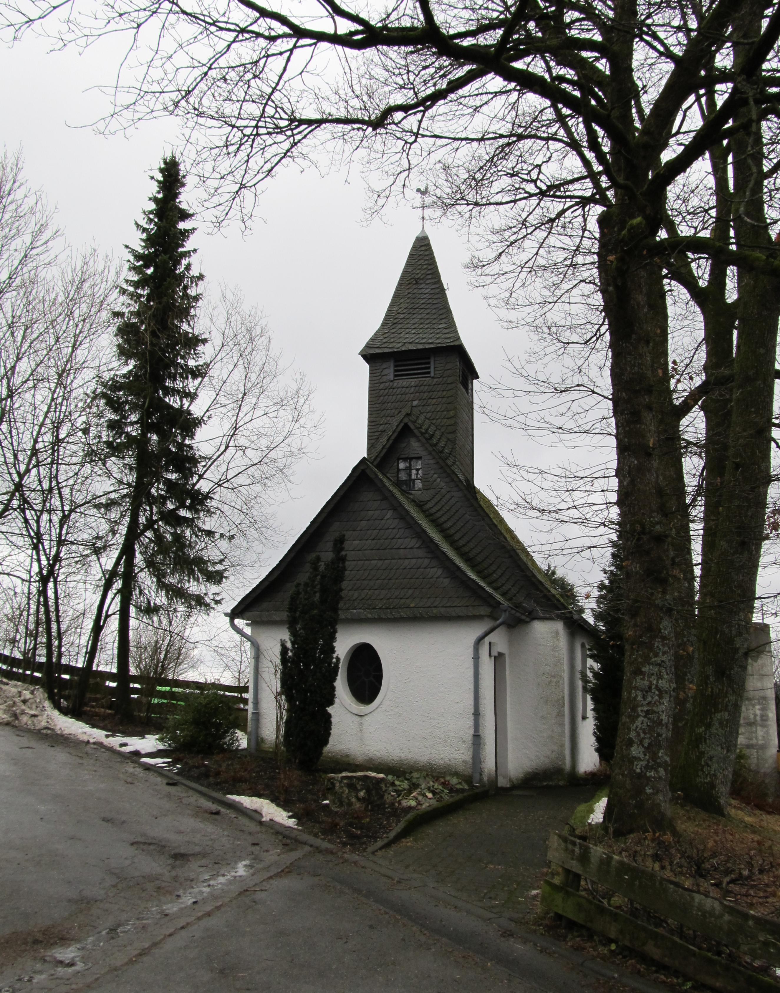 St.-Antonius-Kapelle, Bestwig-Wasserfall (Germany)